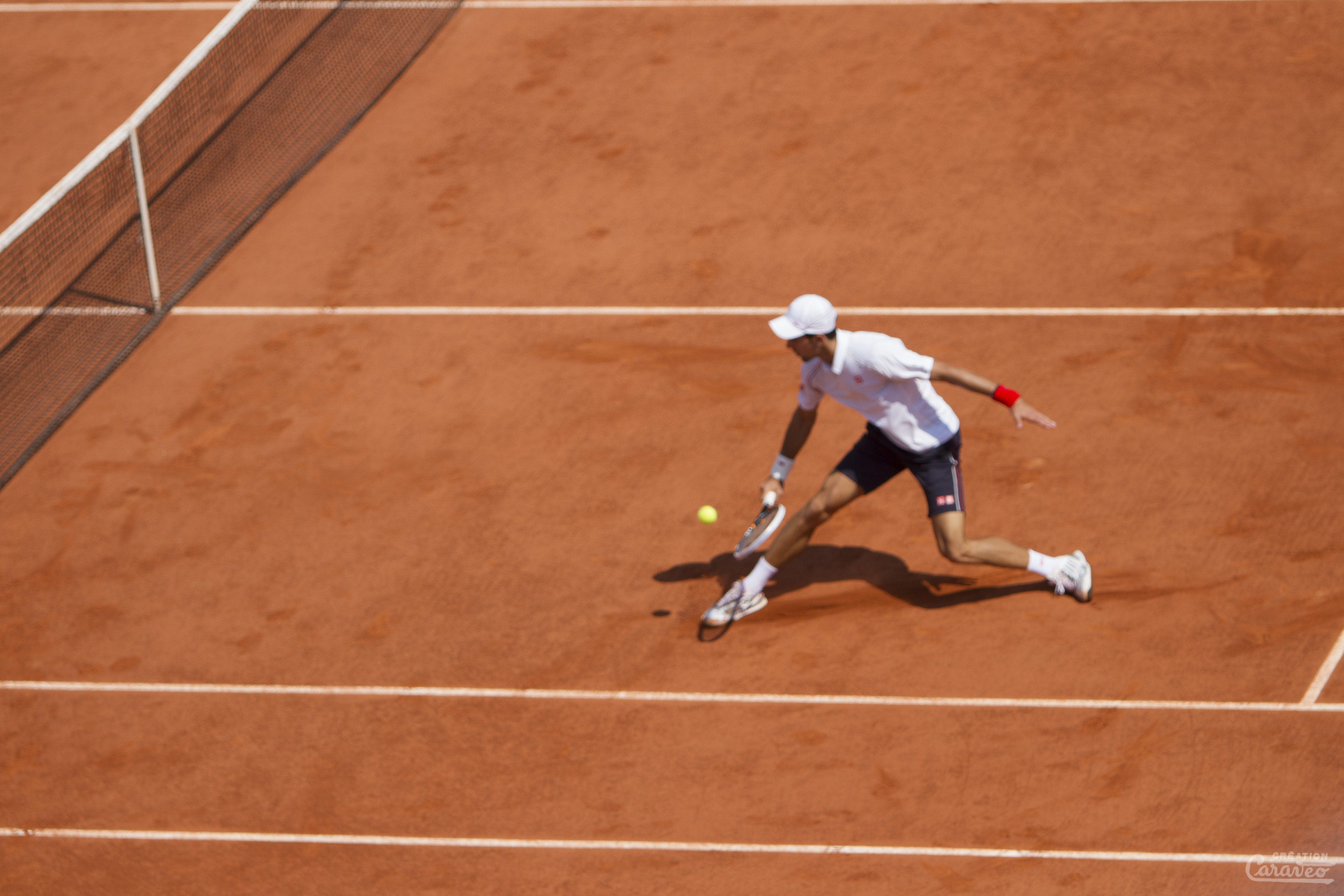 Novak Đoković, Roland-Garros 2012.